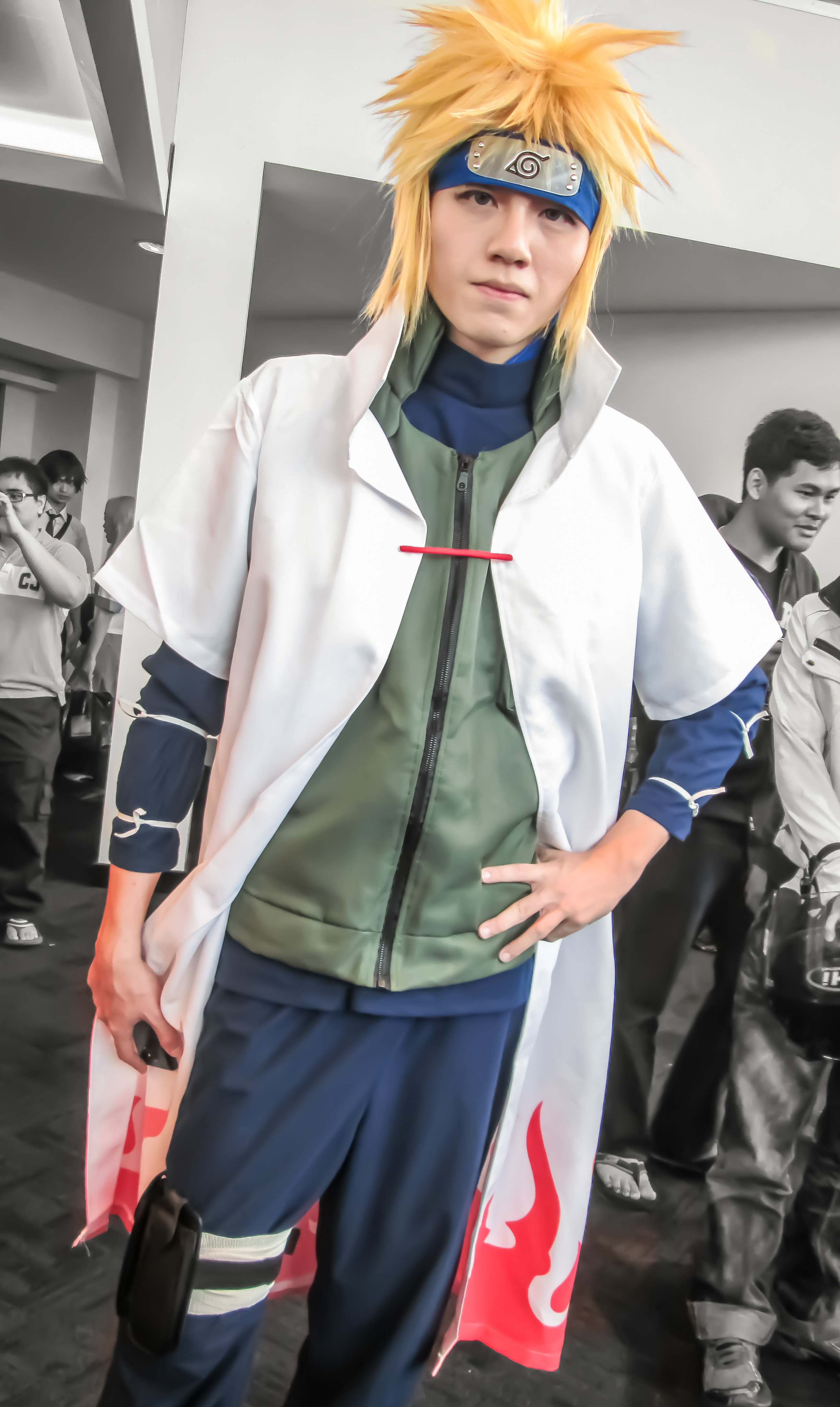 中文（台灣）: AniManGaki 2014，《火影忍者》波風湊cosplayer。